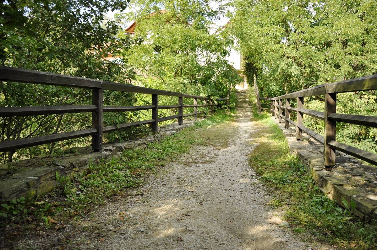 silniční most, přes Bobravu, Rosice